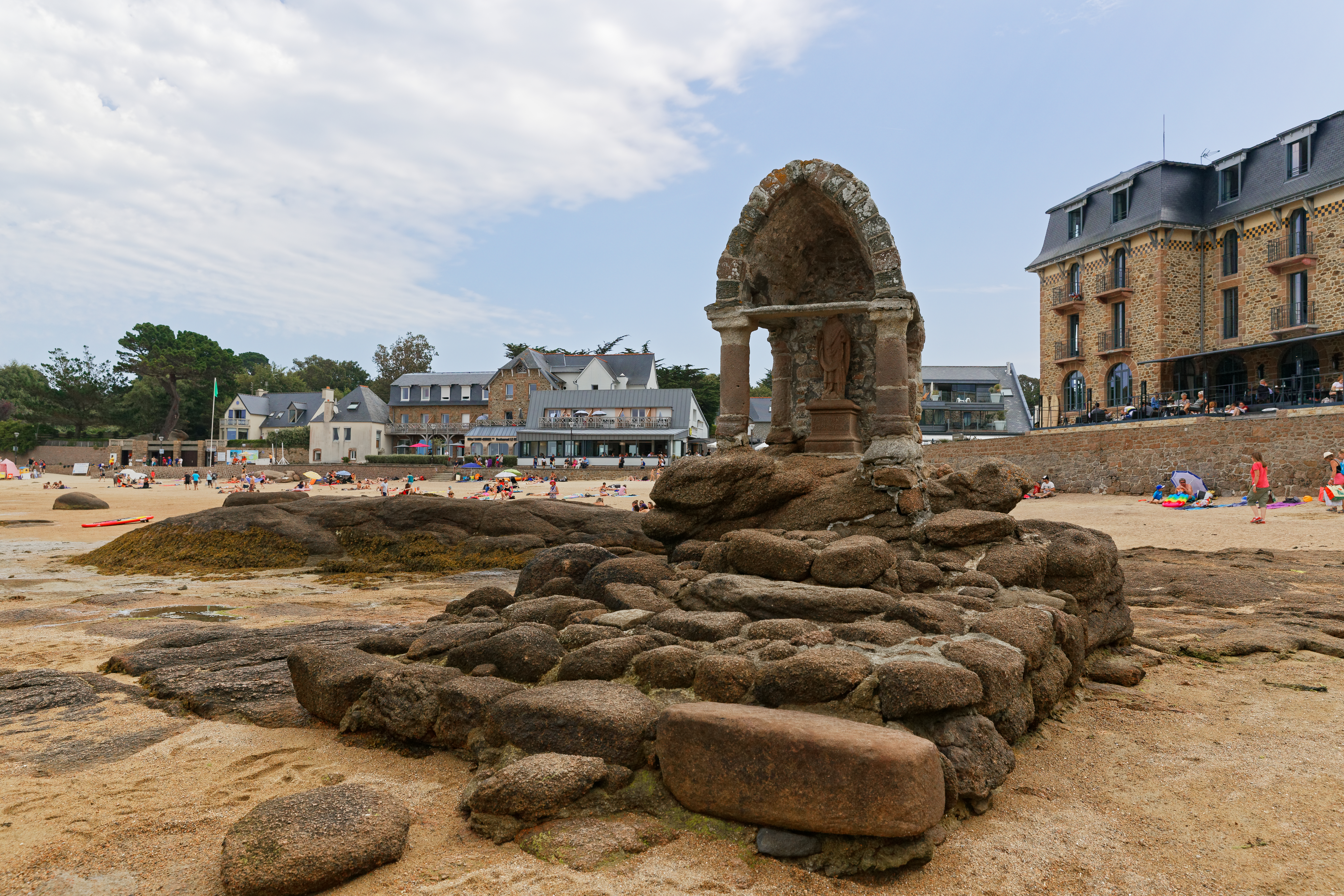 La côte de granite rose dans les Côtes d'Armor en suivant le chemin suivant